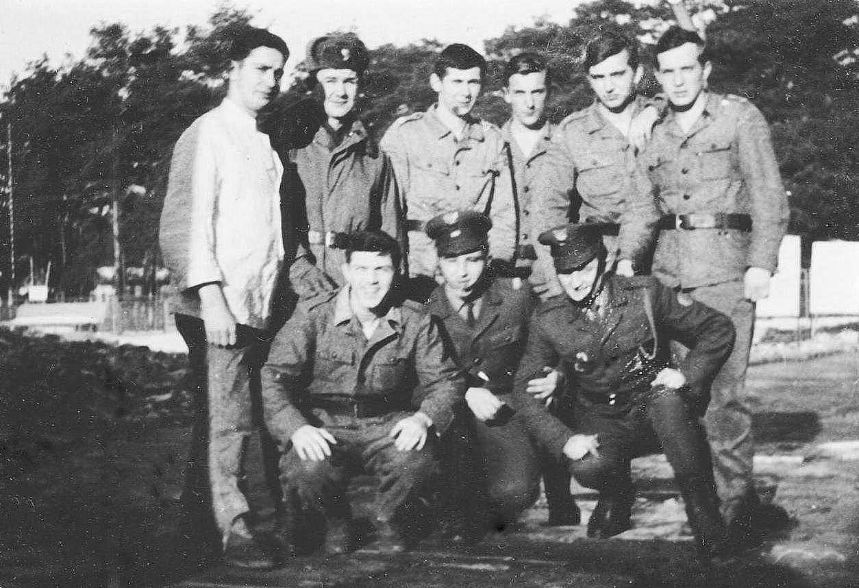 Żołnierze WOP – Strażnica Wojsk Ochrony Pogranicza Dziwnów